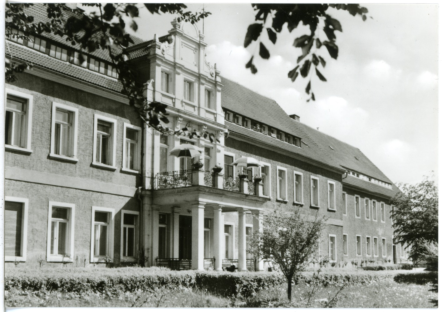 Ohorn; Vollbild - Pflegeheim This postcard is from publisher Brück & Sohn in Meißen ( postcard has a unique number 30129 and is available in a higher resolution at the publisher. This images was uploaded in a cooperation project between Wikipedians and the publisher.